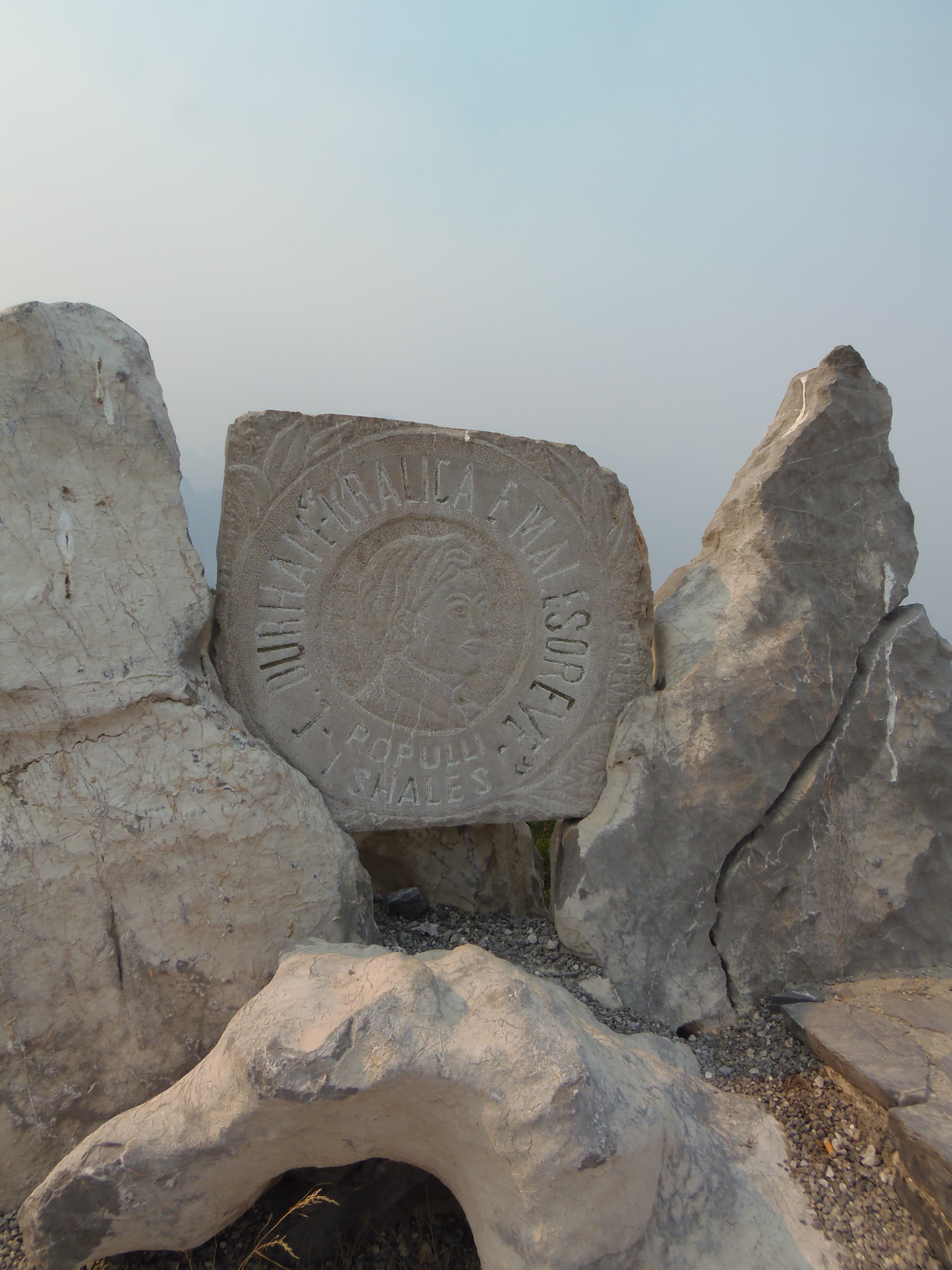 Thethi, Shkoder